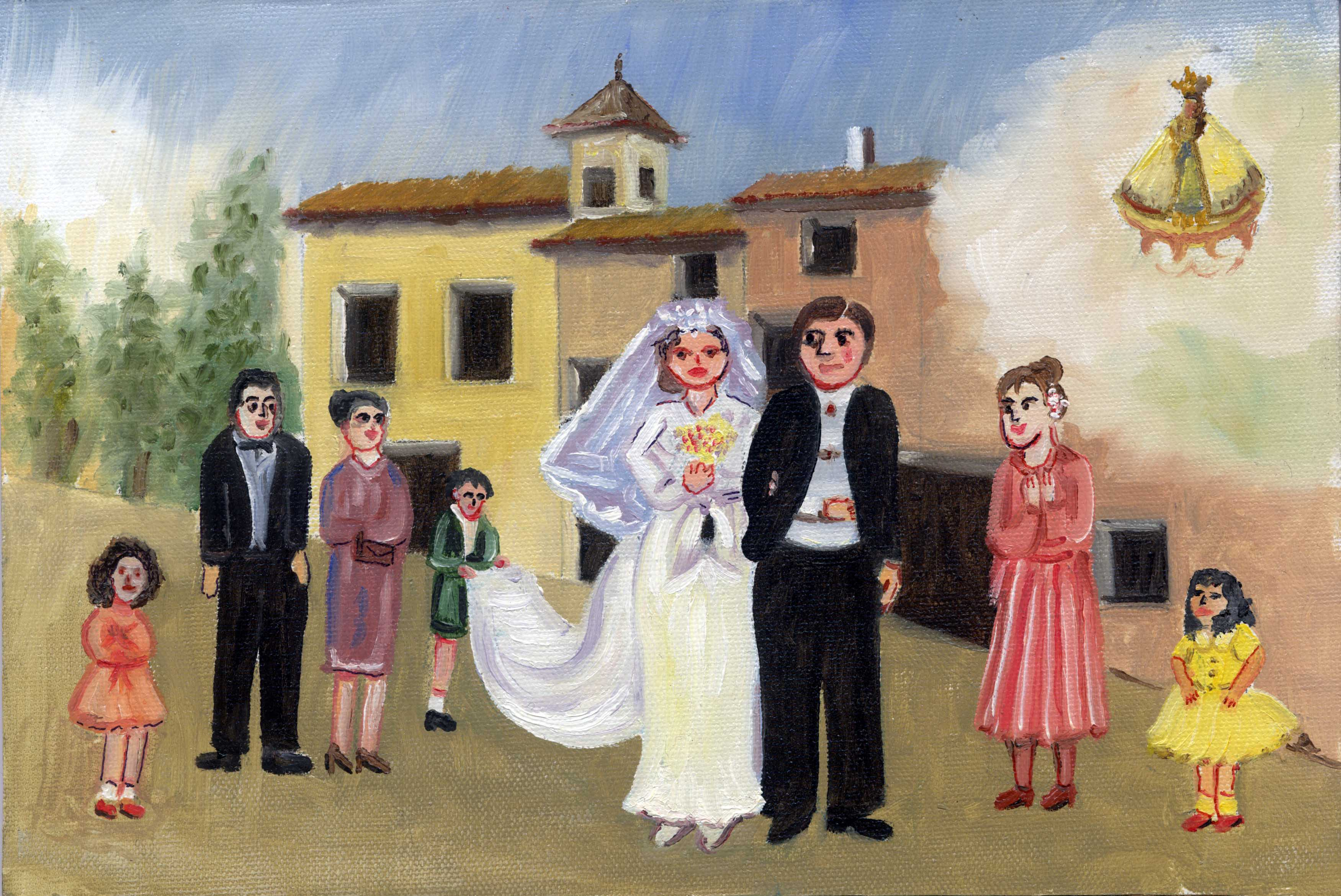 Exvots de l'exposició "secà i muntanya". Narracions tradicionals il·lustrades seguint l'estètica del llenguatge tradicional per a explicar anècdotes pròpies del camp valencià del segle XIX. Imatges realitzades per Andrés Marín Jarque.